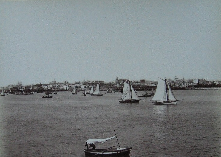 Vista de la Ciudad de Buenos Aires desde el Río de la Plata.